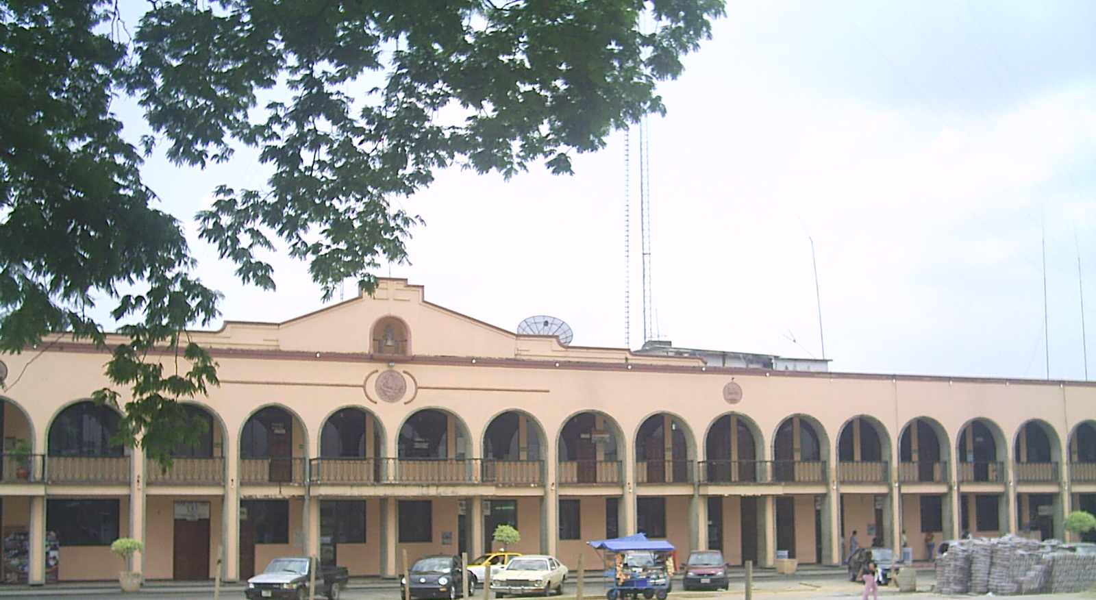 Imagen del Palacio Municipal del H. Ayuntamiento de San Juan Bautista Tuxtepec, Oaxaca, México